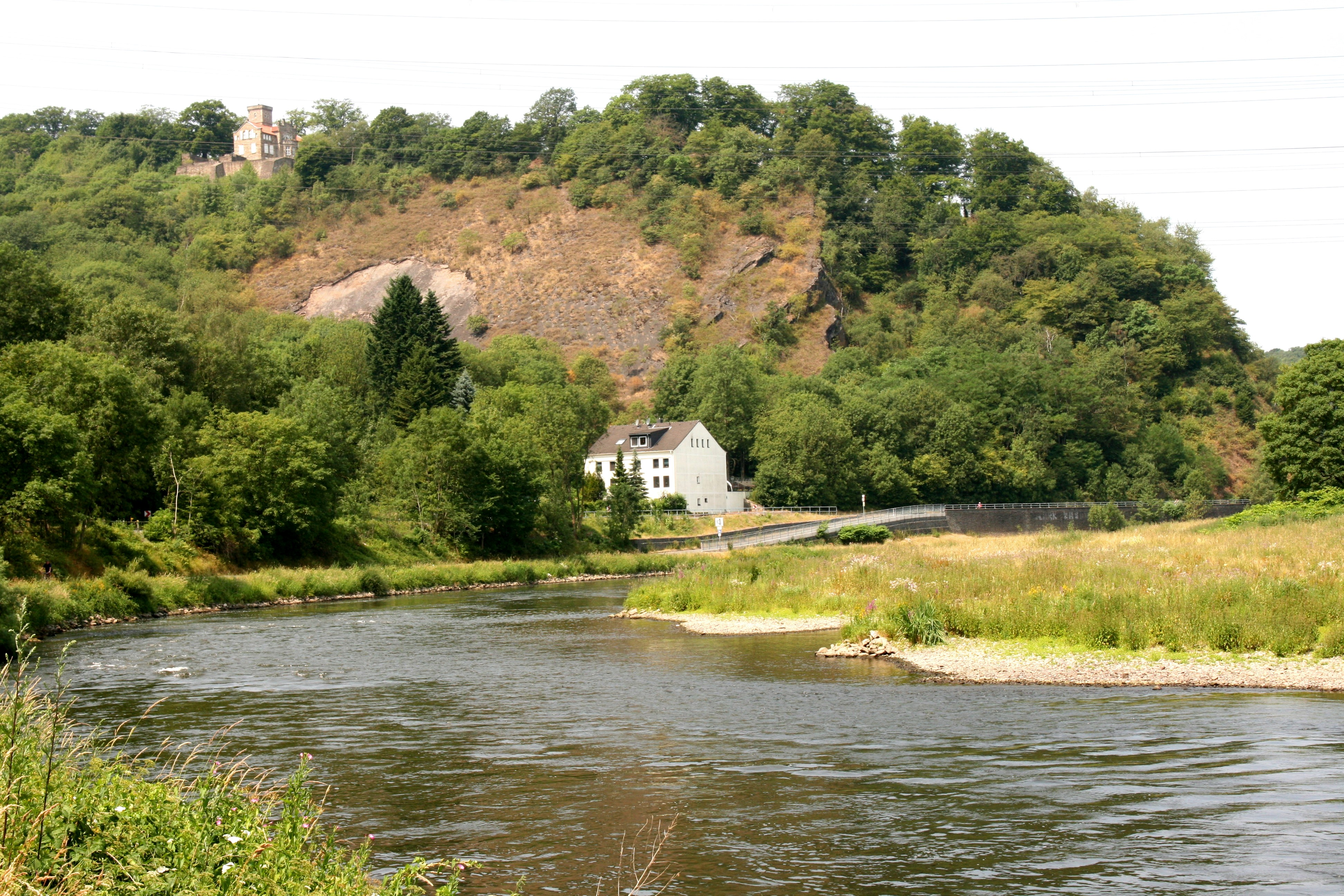 Leinpfad unterhalb des Isenbergs in Hattingen